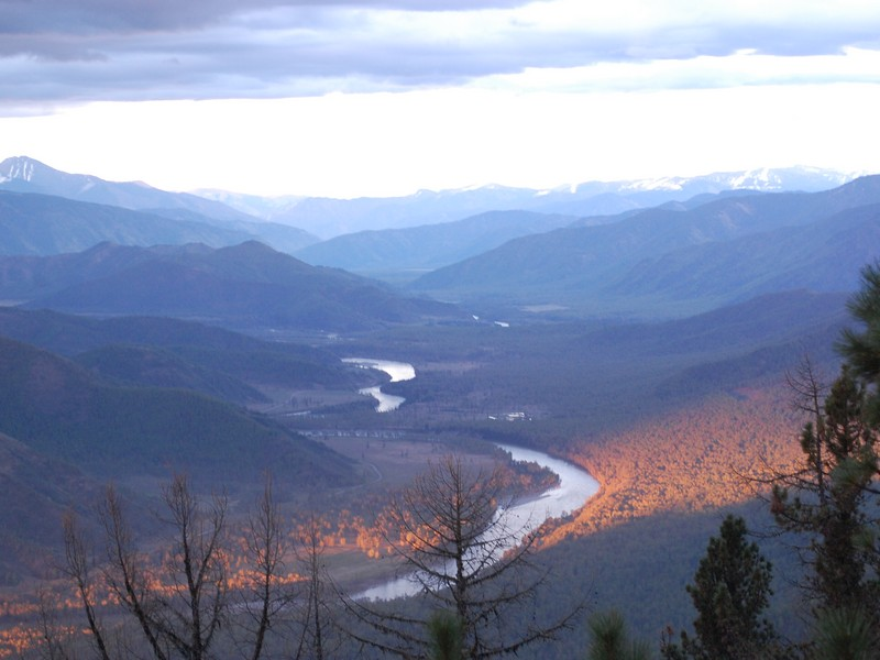 Река в долине Алтая.